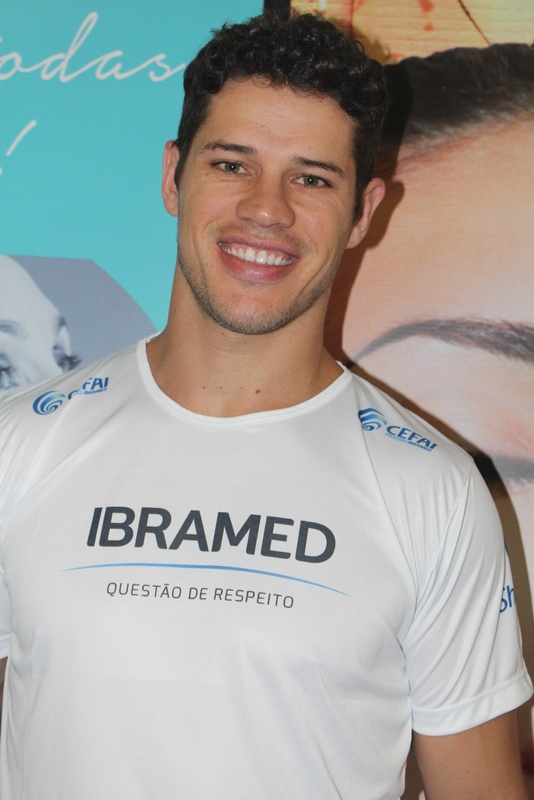 Jose Loreto-004